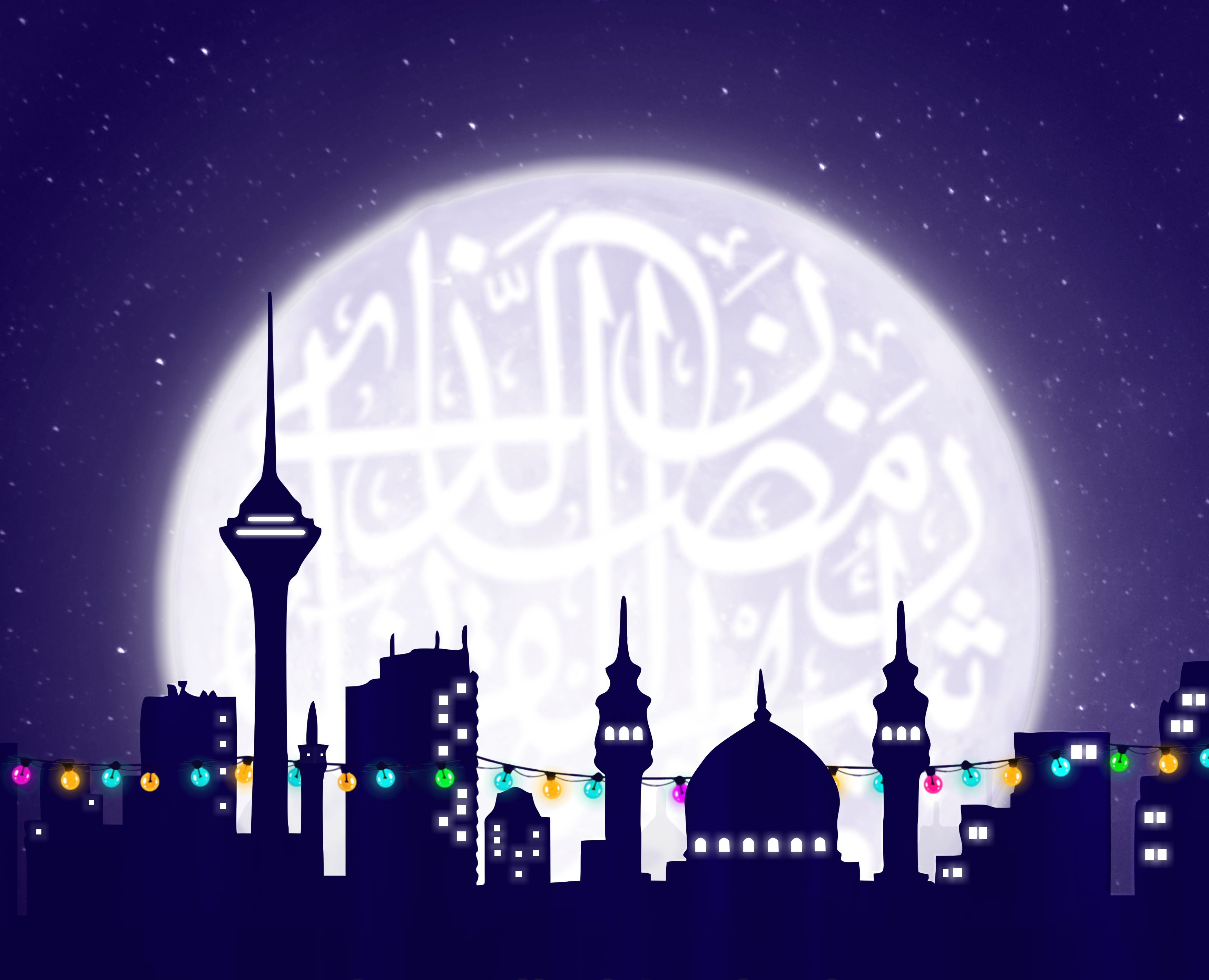 سحر ماه رمضان